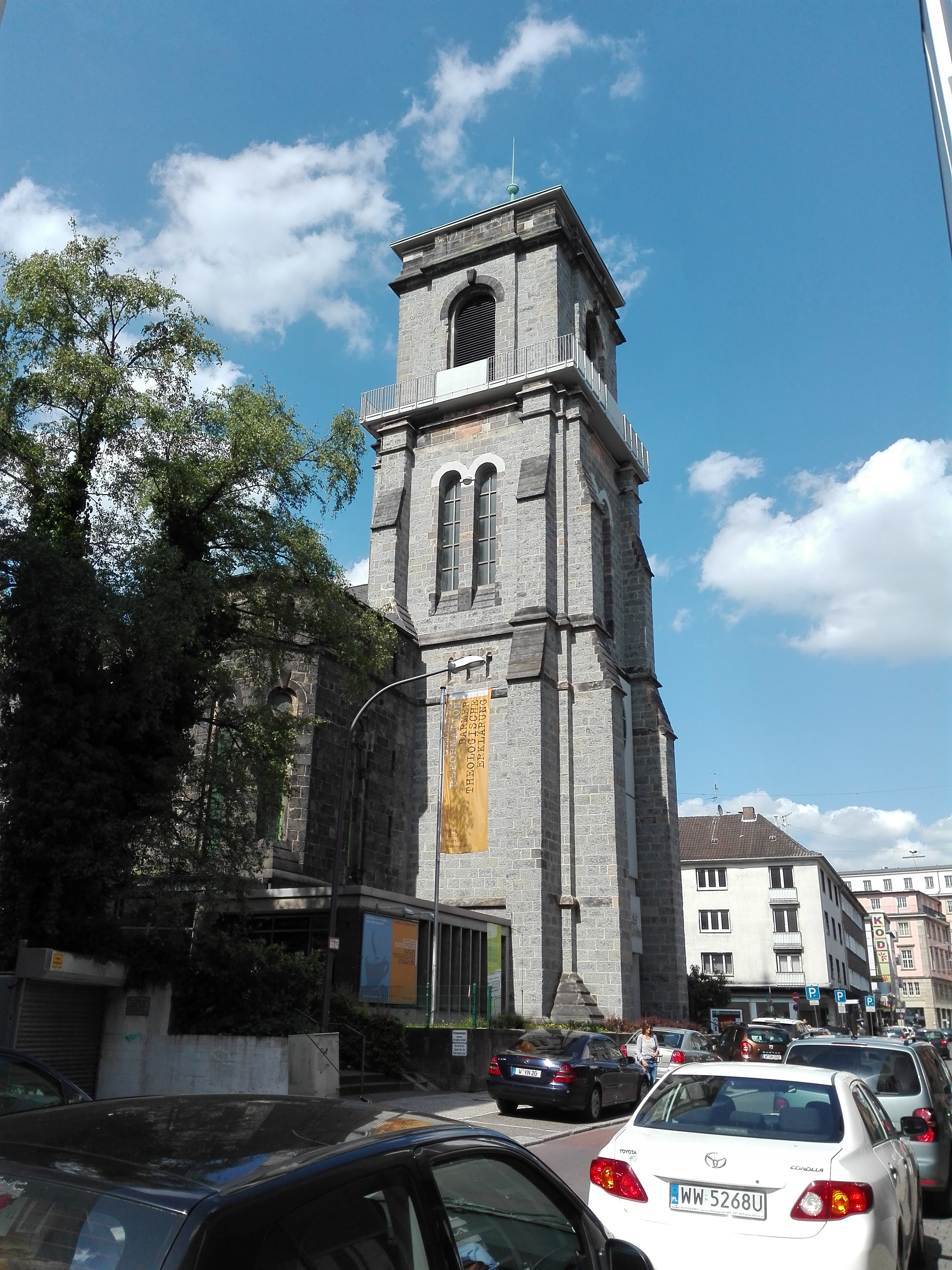 Die ach so tolle Gemarker Kirche in Wuppertal-Barmen